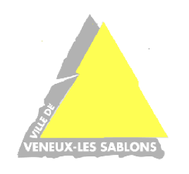 Logotype de la Ville de Veneux-Les Sablons